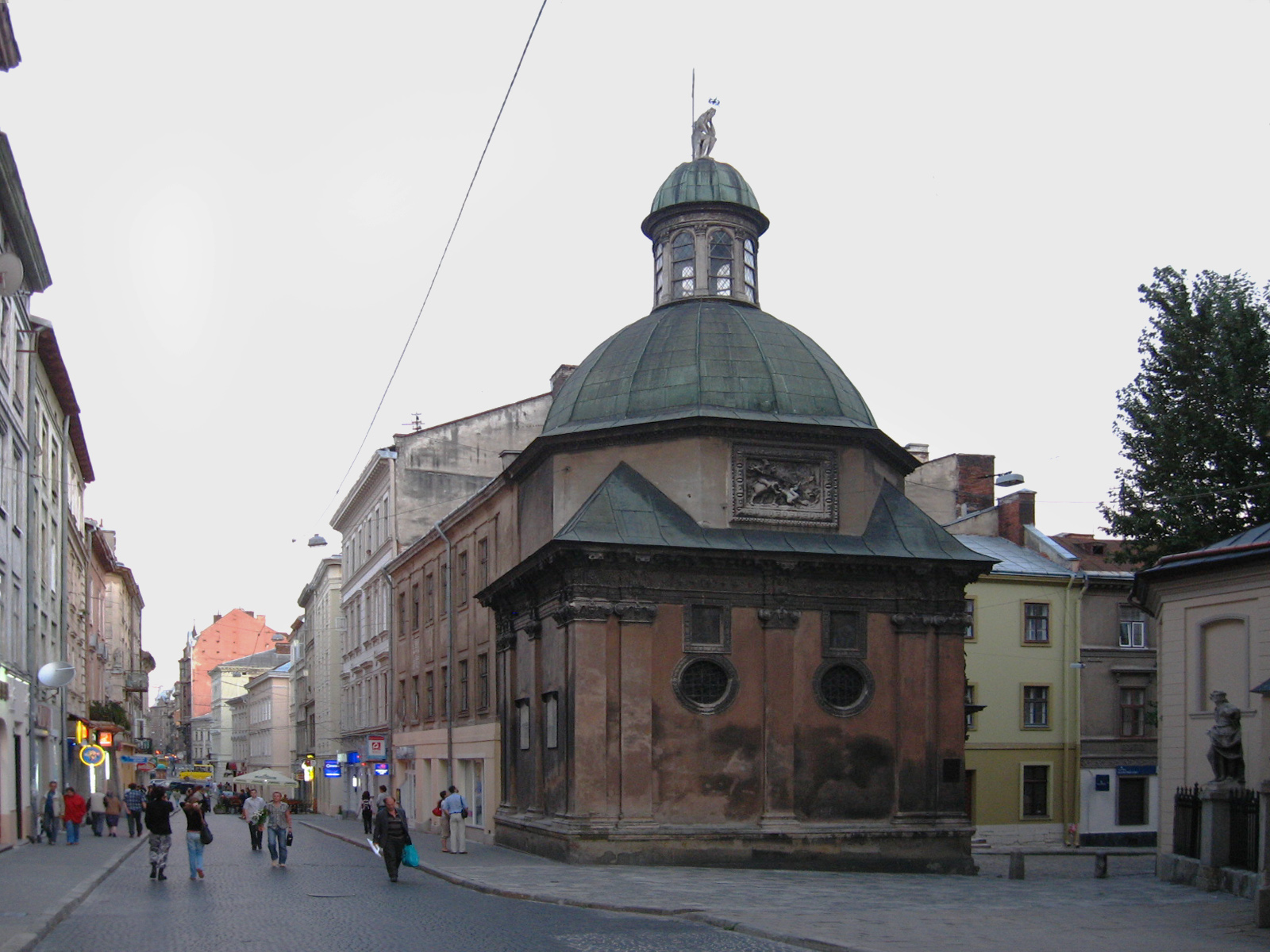 Часовня Боимов во Львове Licensing Категория:Изображения:Львов